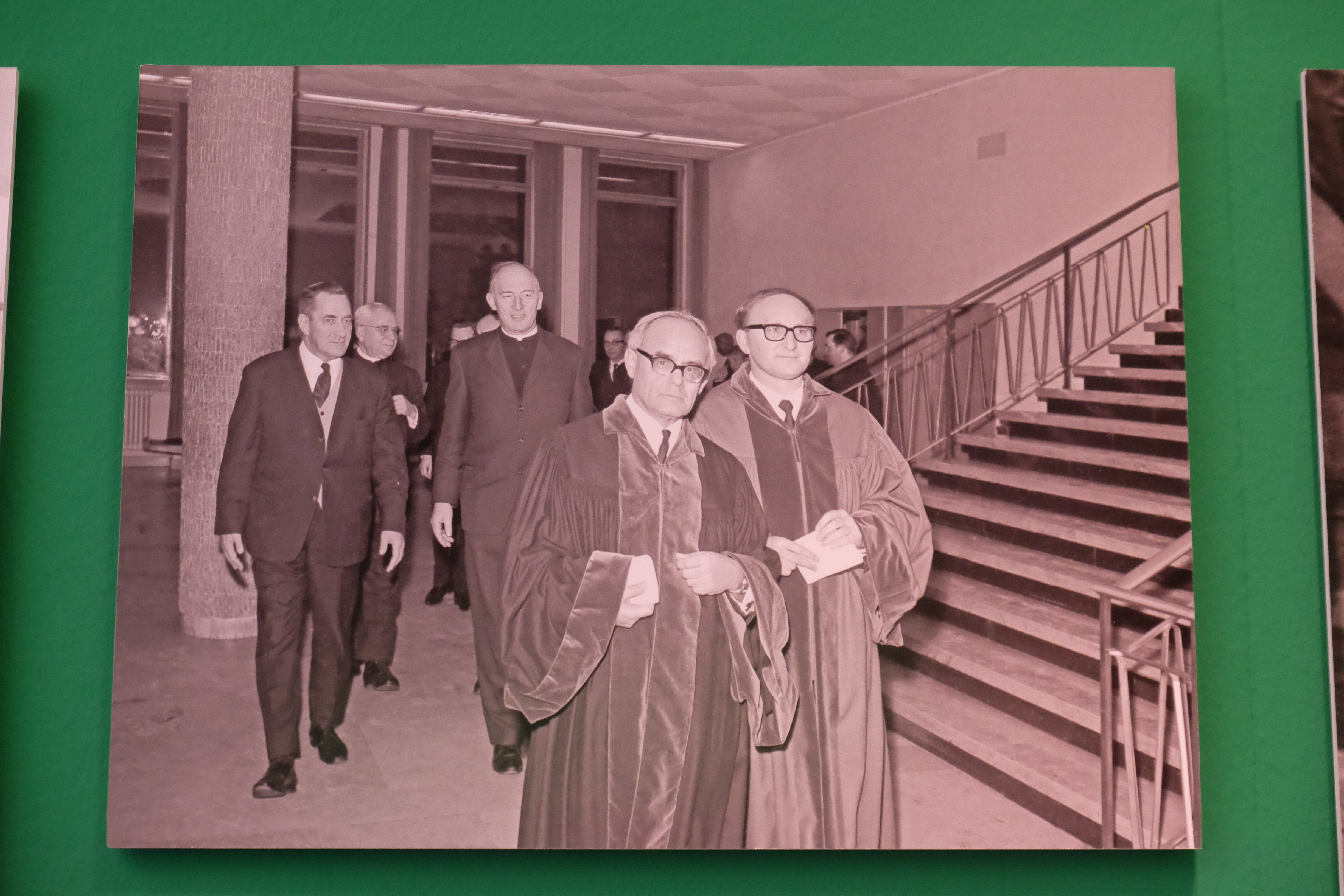 Karl Rahner und Metz bei der Antrittsvorlesung 1971